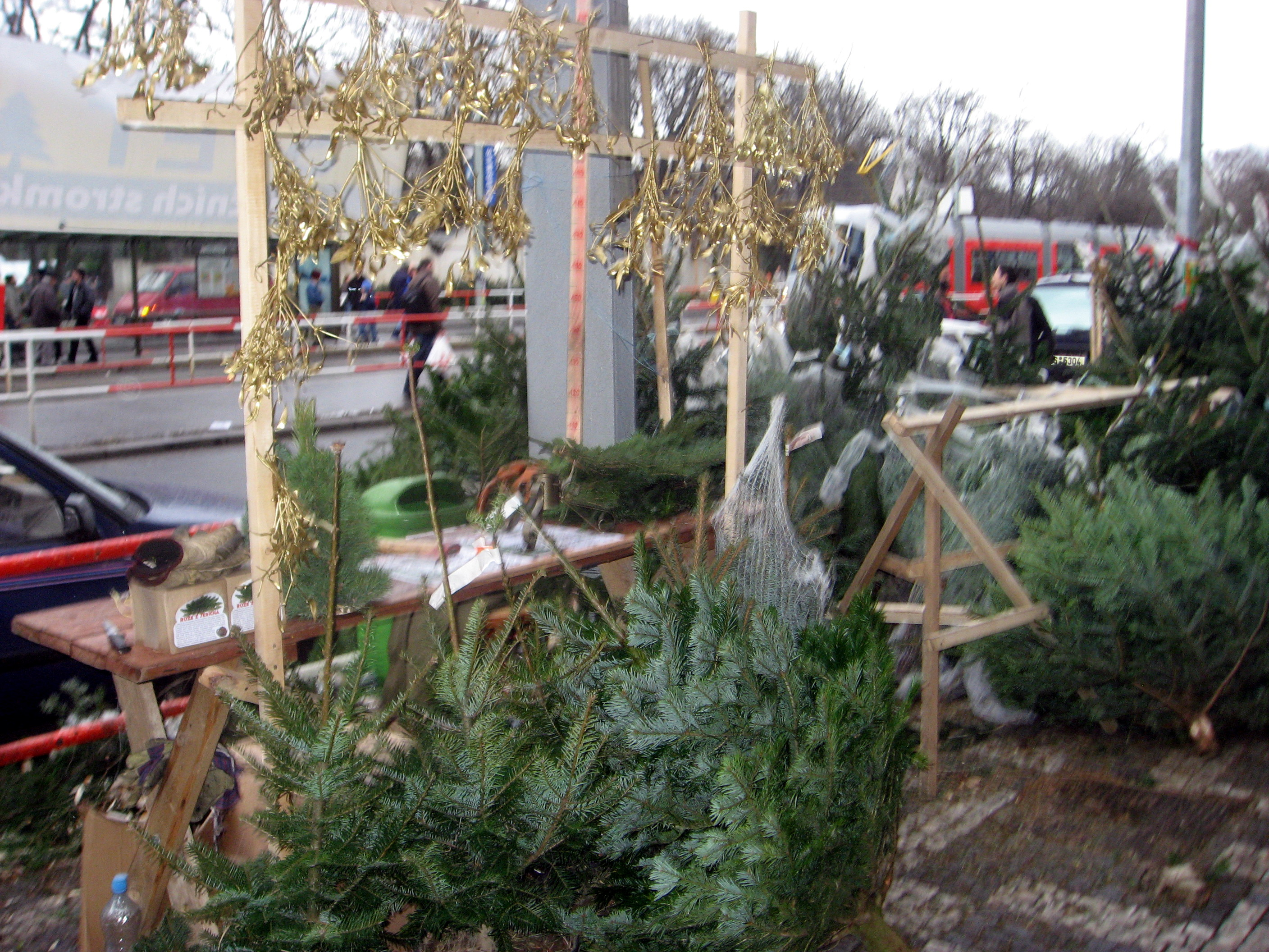 Prodej vánočních stromků a jmelí na Flóře